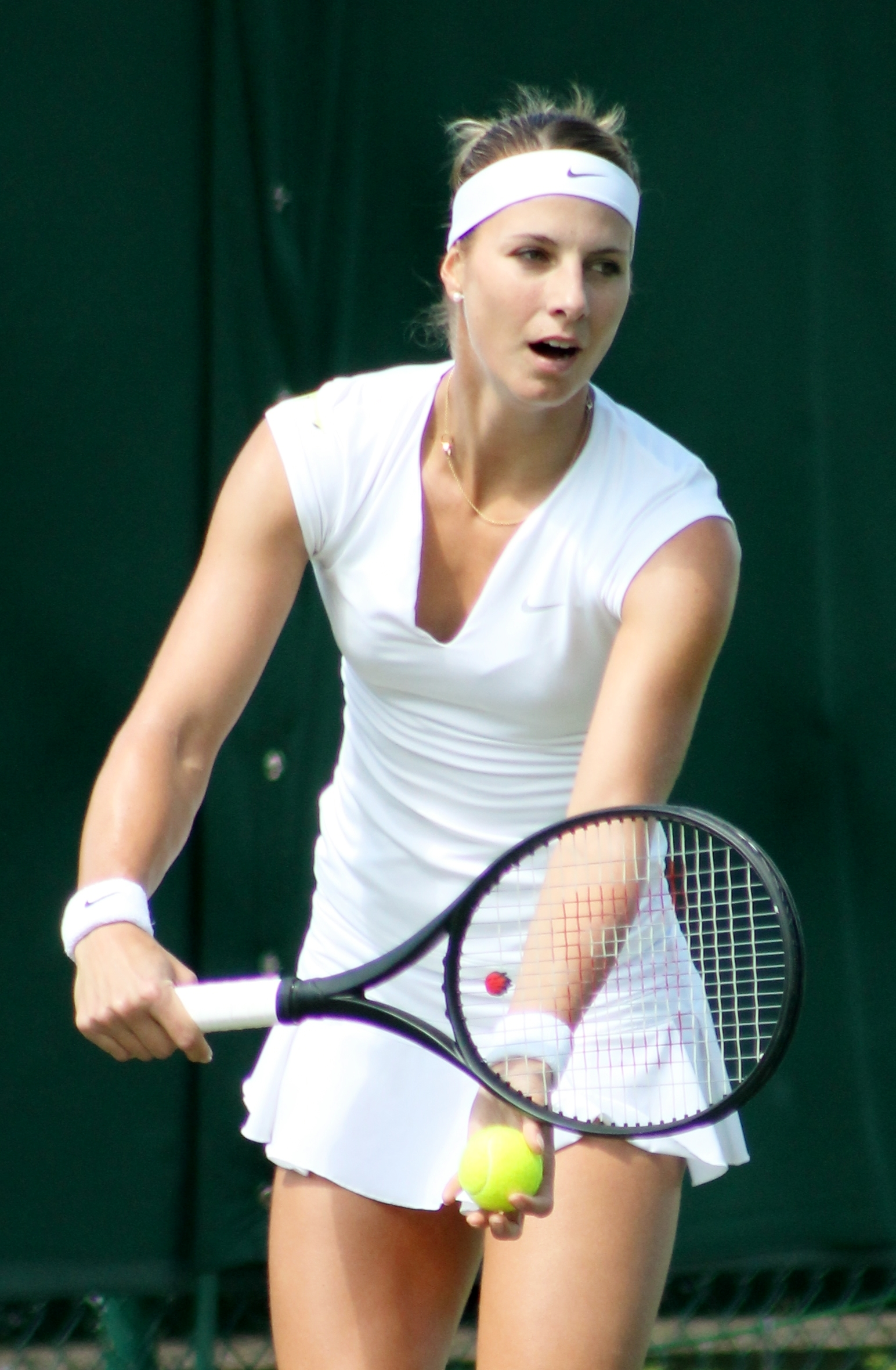 Minella WMQ14 (1)